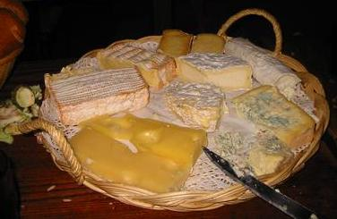 copyright: Dan Chak. Valt onder de Creative Commons Attributions/Share Alike License